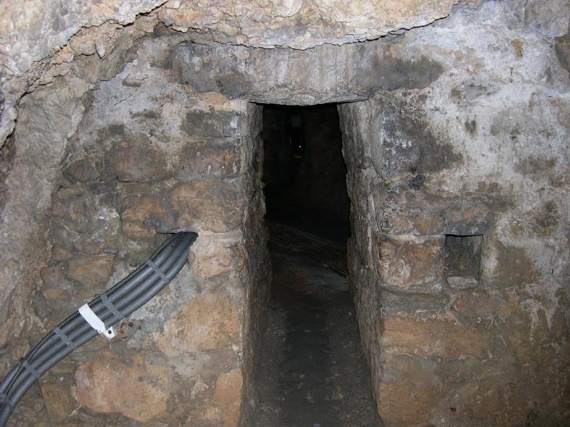 Entrada al Acueducto o Túnel de Eupalinos en la isla de Samos (Grecia)